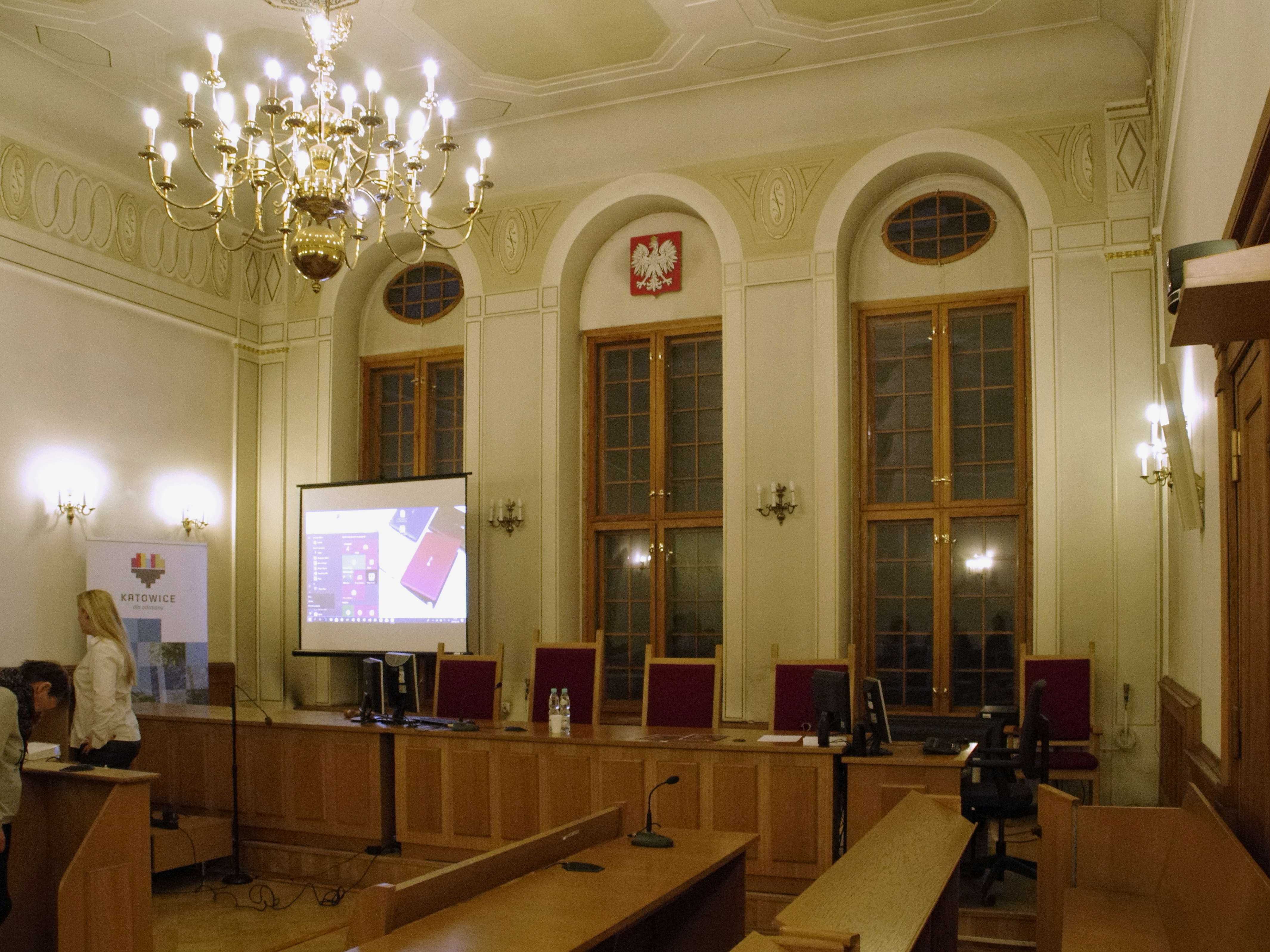 Wnętrze budynku przy pl. Wolności 10 w Katowicach, największa sala na 1. piętrze, obecnie sala sądowa.